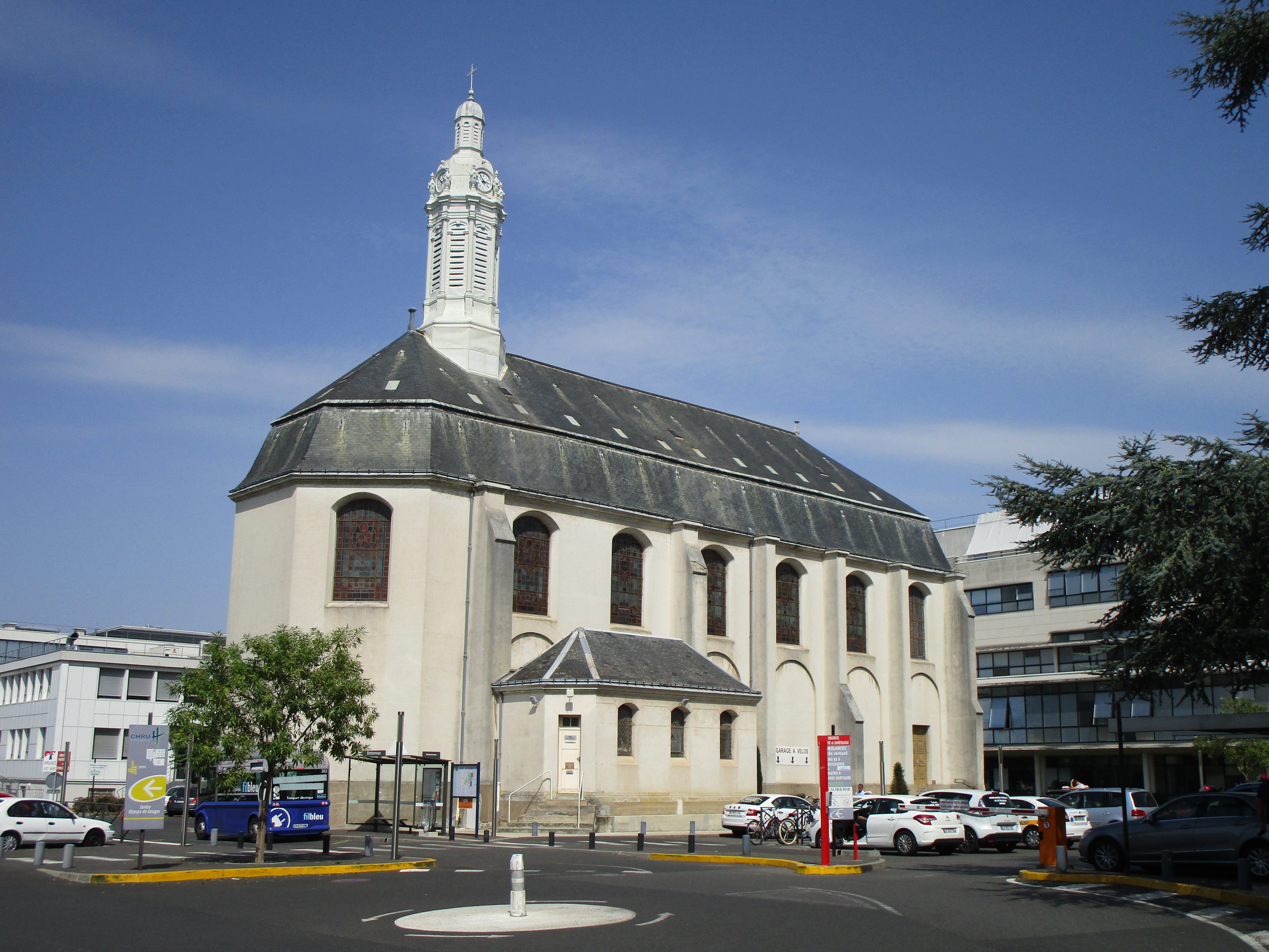 Chapelle de l'hôpital Bretonneau de Tours dédiée à Saint-Roch, dans le quartier Rabelais-Tonnellé